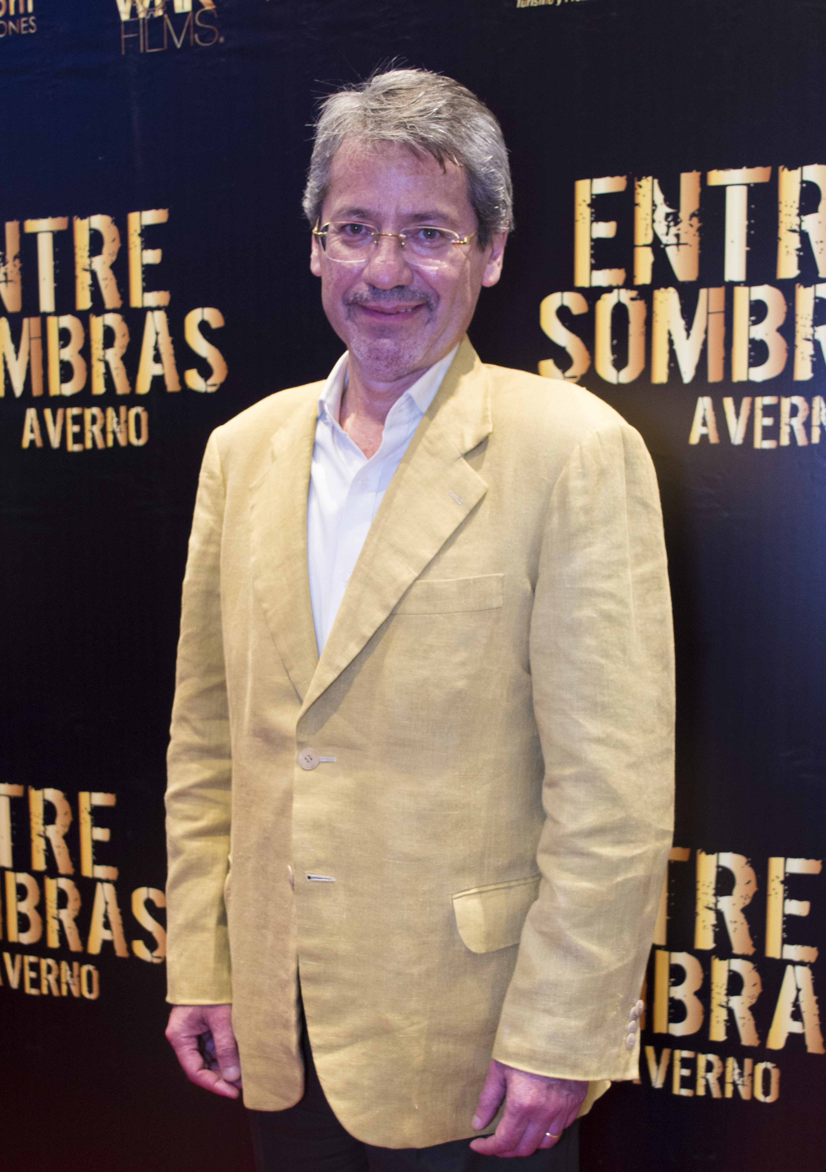 Raúl Vallejo en el Avant Premier de la película ecuatoriana Entre Sombras: Averno.